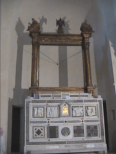 Ex altare della chiesa sconsacrata di Santa Lucia a Gaeta, costruito nel 1937 e smembrato nel 2009.